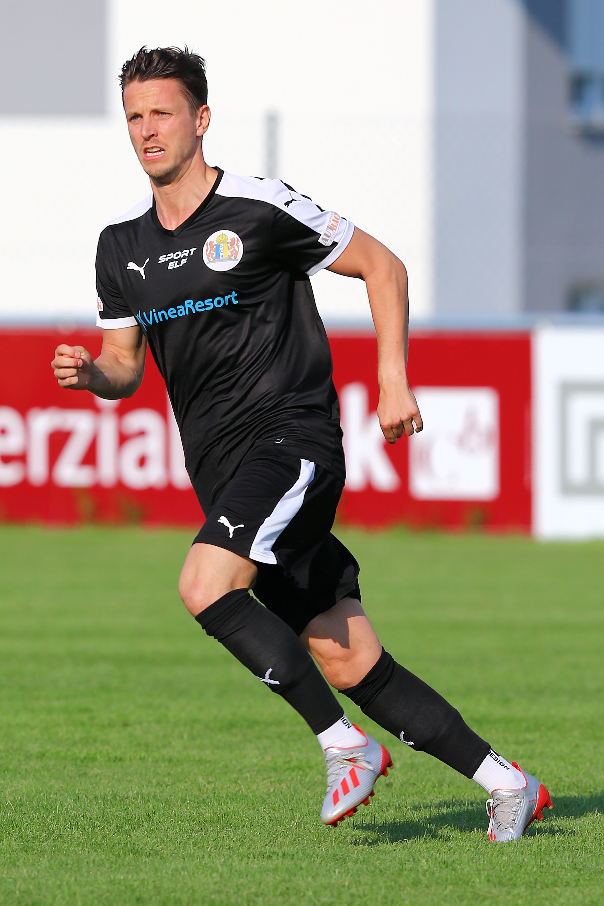 Meisterschaftsspiel der Landesliga Burgenland 2018/19 ASV Draßburg (rote Trikots) vs. SC Ritzing (schwarze Trikots) 2:3 (0:3) am 1. Juni 2019 in Draßburg. – Das Bild zeigt Daniel Wolf.